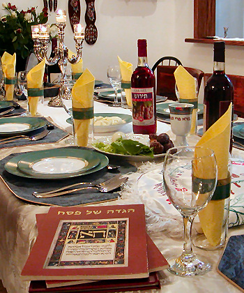 Беларуская (тарашкевіца): Сэрвіроўка сталу на Сэдэр.